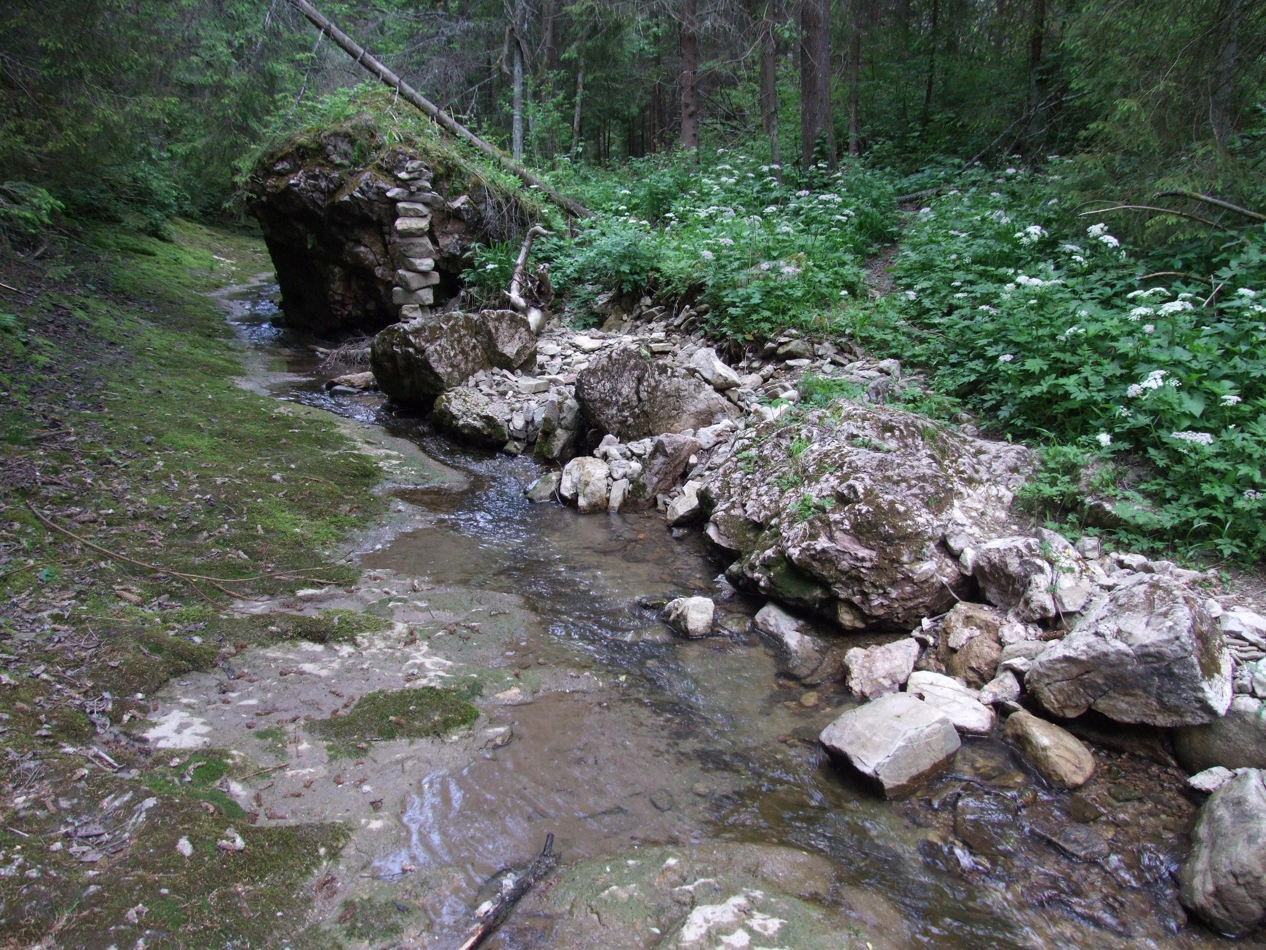 Malý Lipnik